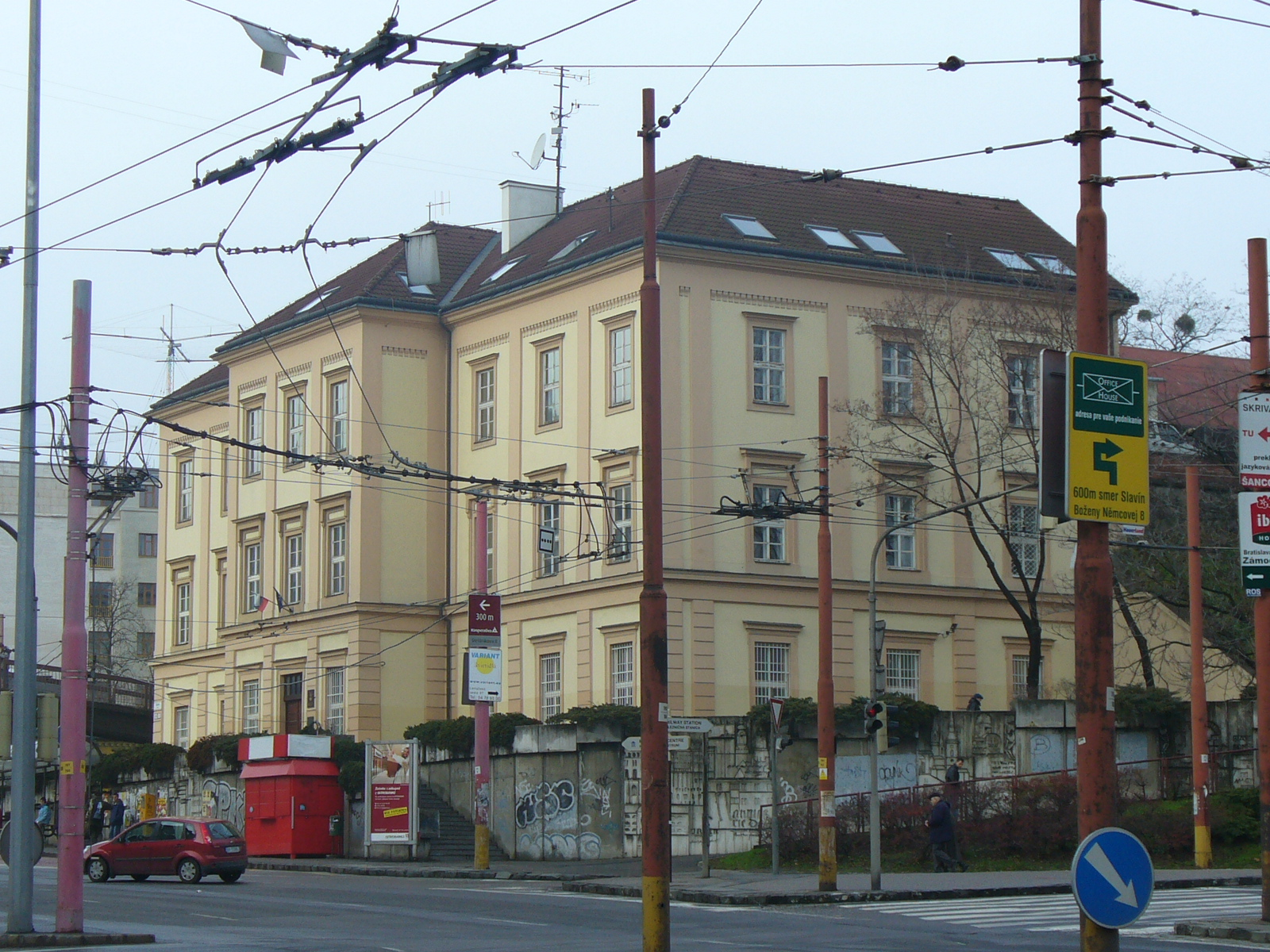 Pierwszy budynek dworcowy w Bratysławie z 1848 roku